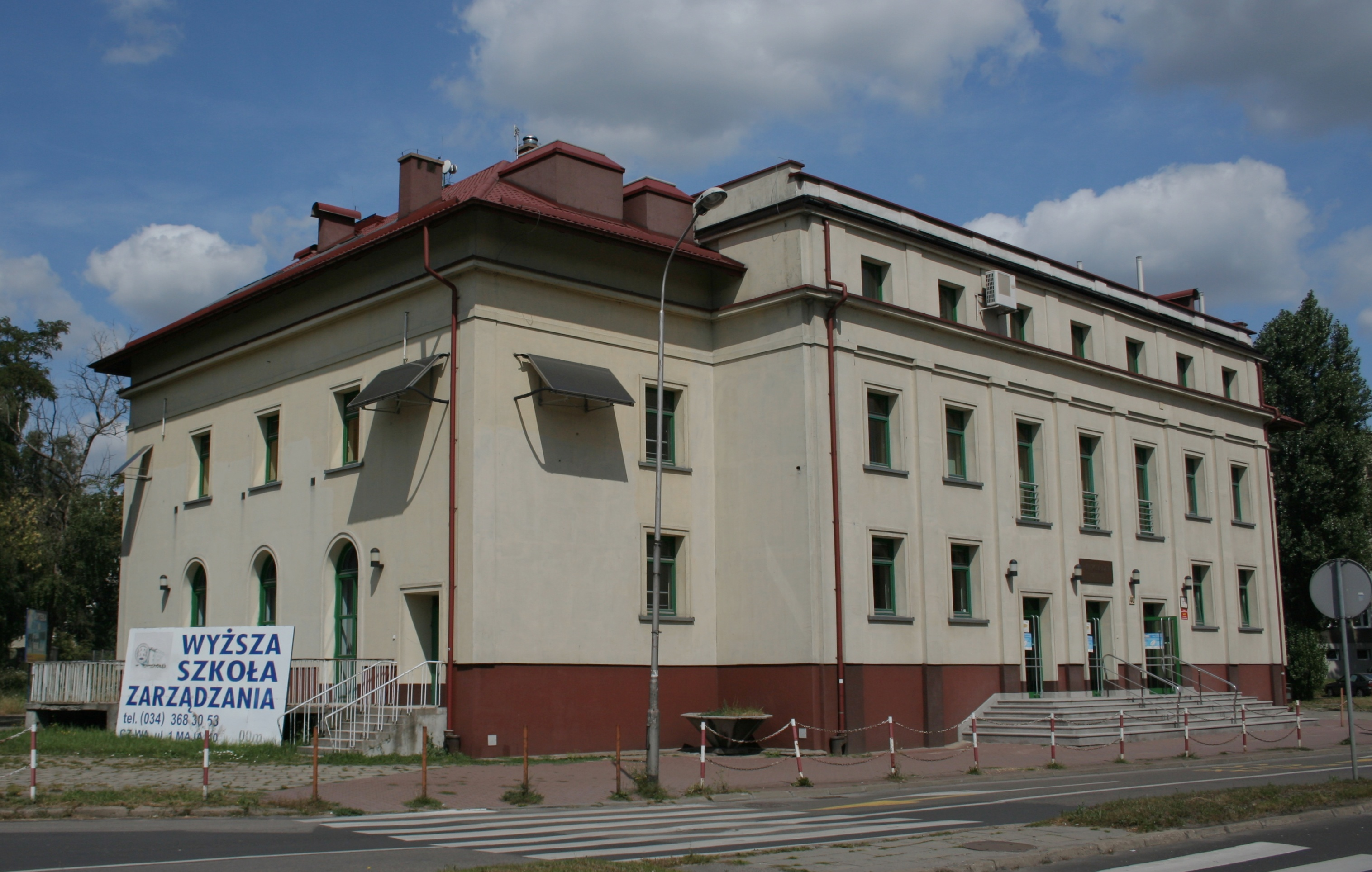 Budynek Wyższej Szkoły Zarządzania w Częstochowie.